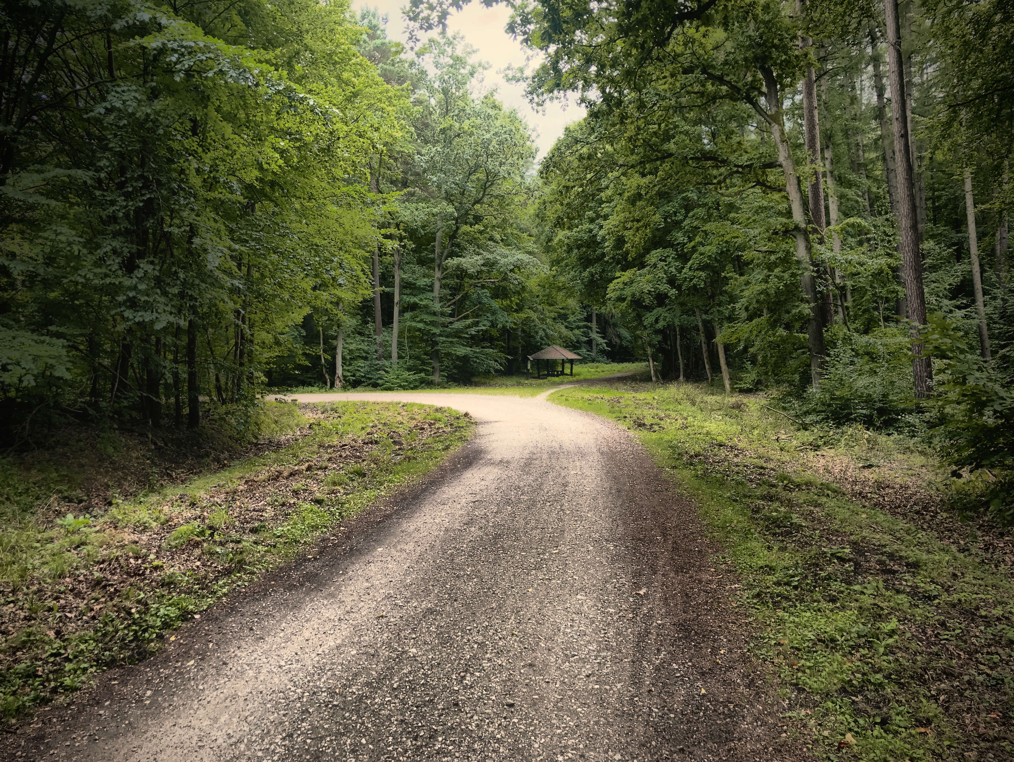 Park krajobrazowy: Trójmiejski Park Krajobrazowy This is a photography of protected area with CRFOP ID PL.ZIPOP.1393.PK.31